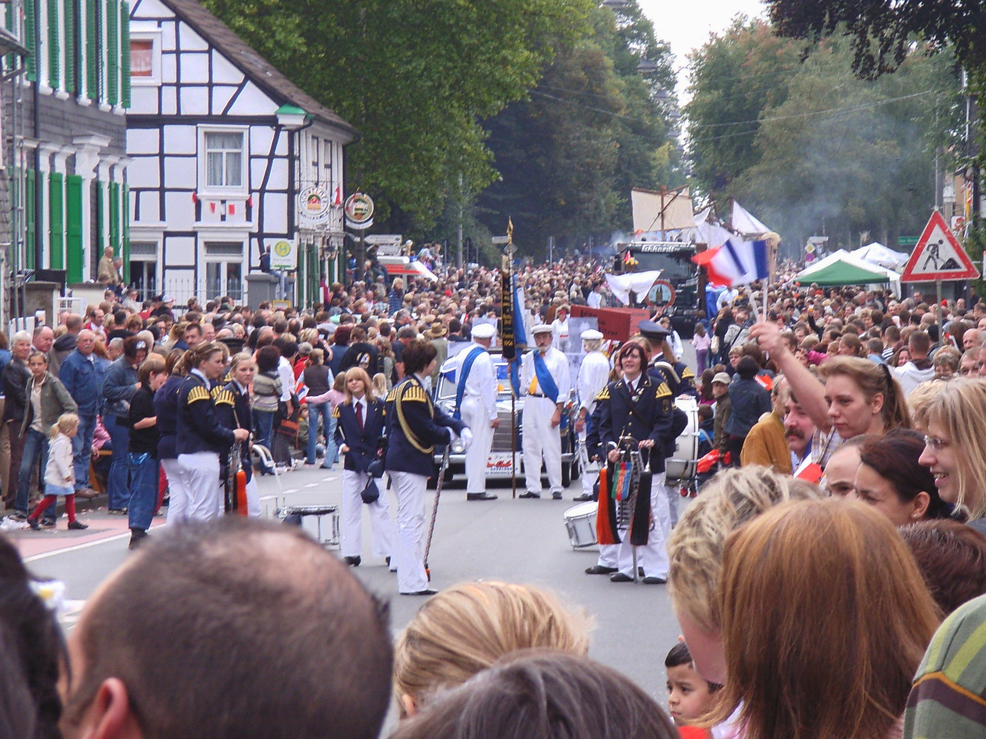 Heimatfestzug in Schwelm an der Barmer Straße